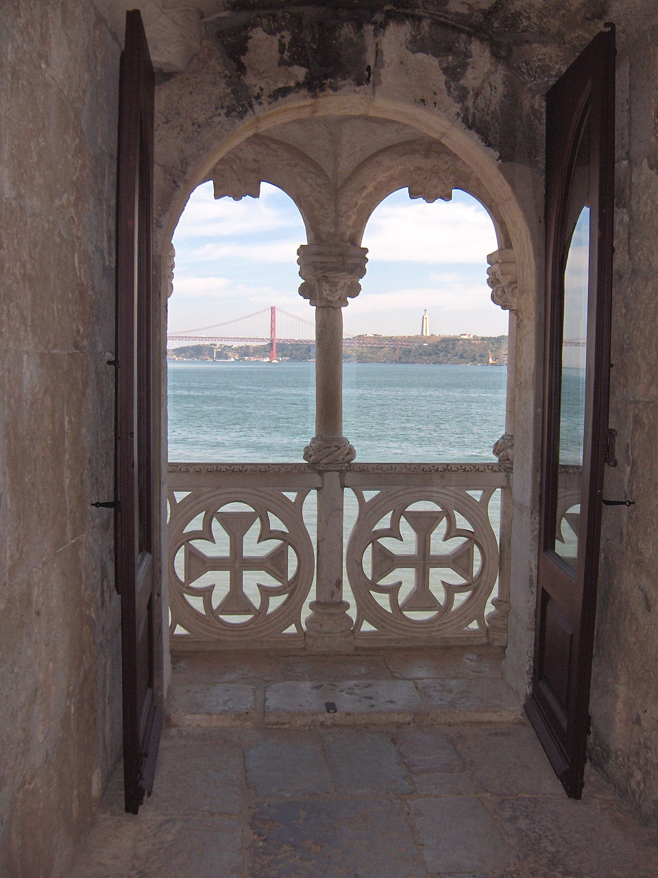 Torre de Belém ,Belém (Lisbon), Portugal